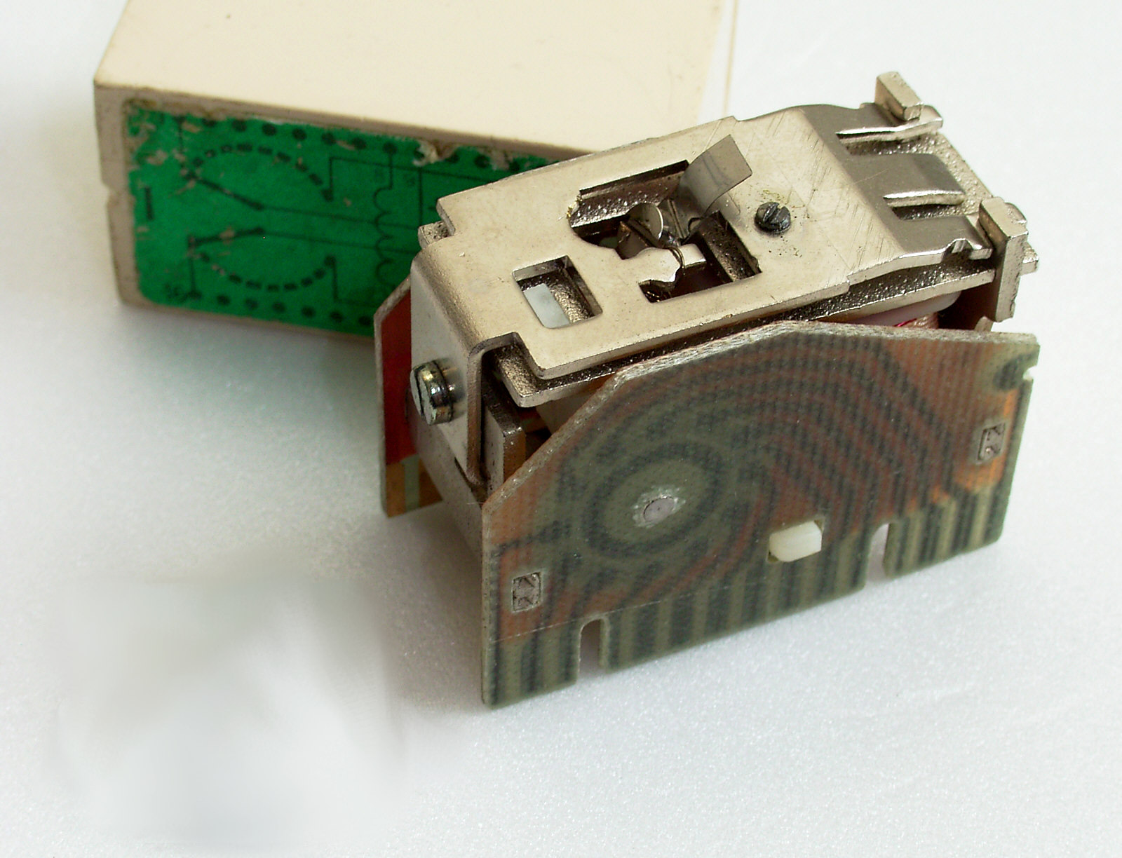 Miniatur-Schrittschaltrelais, geöffnet